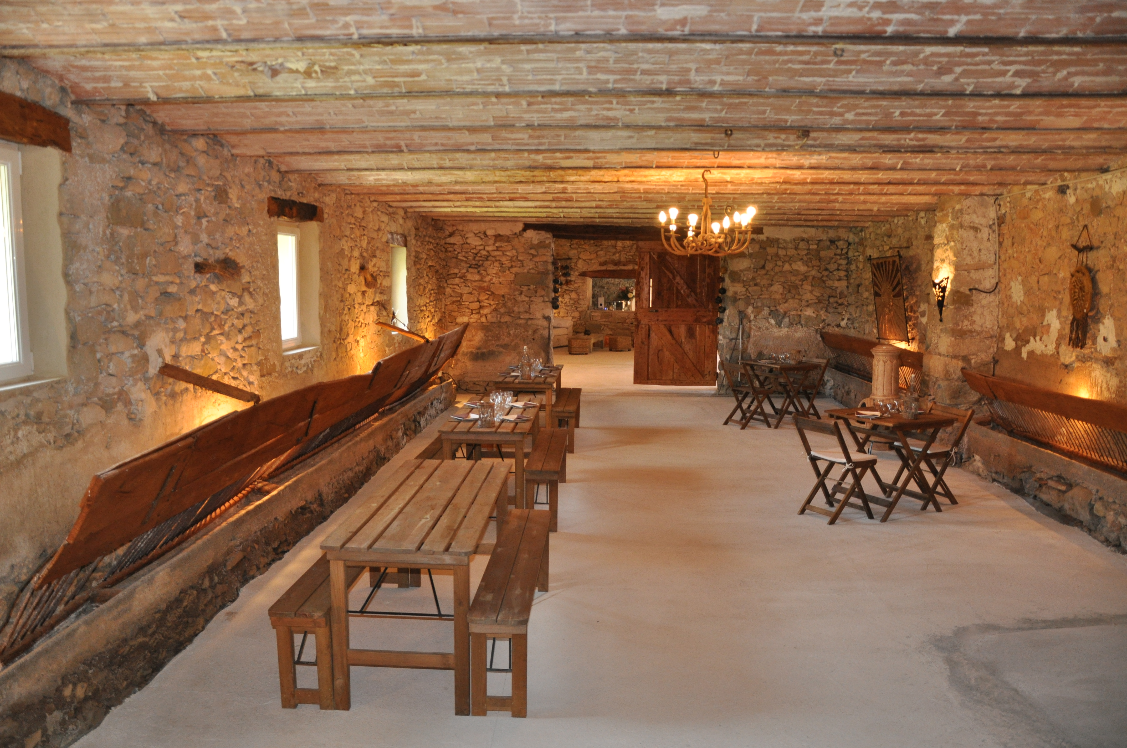 Ancienne écurie de la Fouent Crema à La Rochegiron transformée en salle à manger